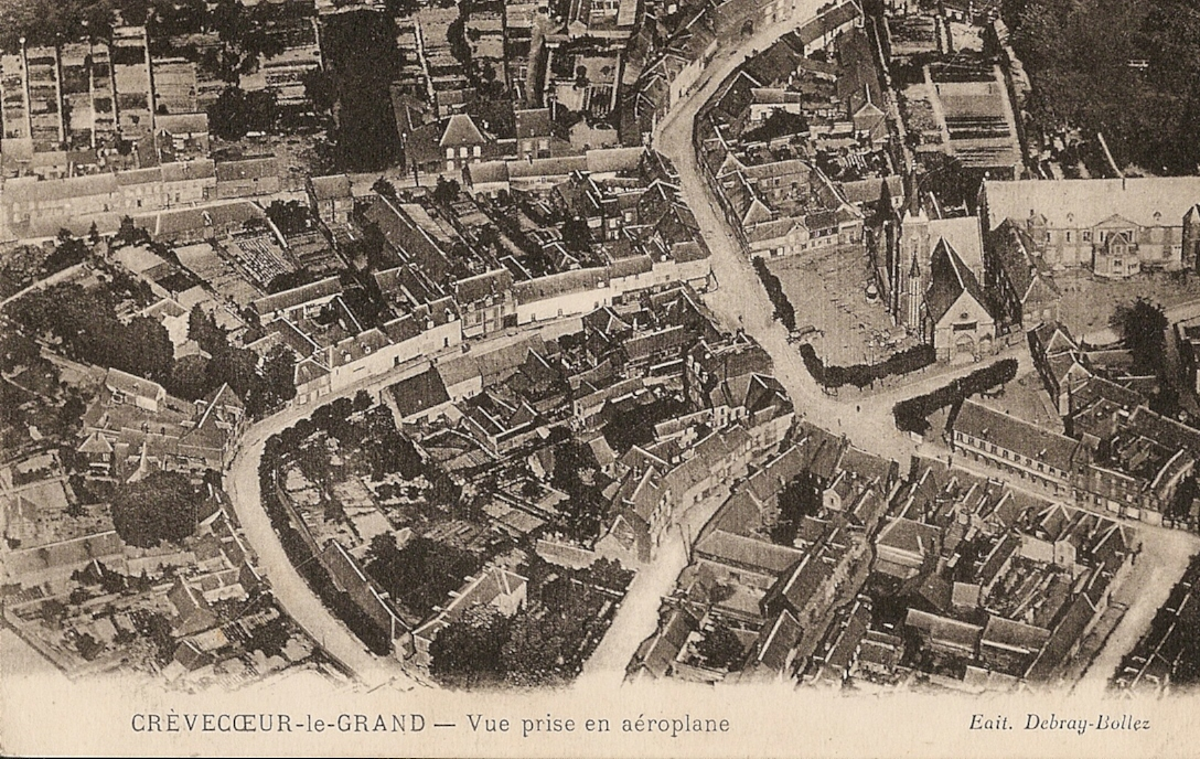 Carte postale ancienne éditée par Debray-Bollez Crèvecœur-le-Grand - Vue prise en aéroplane